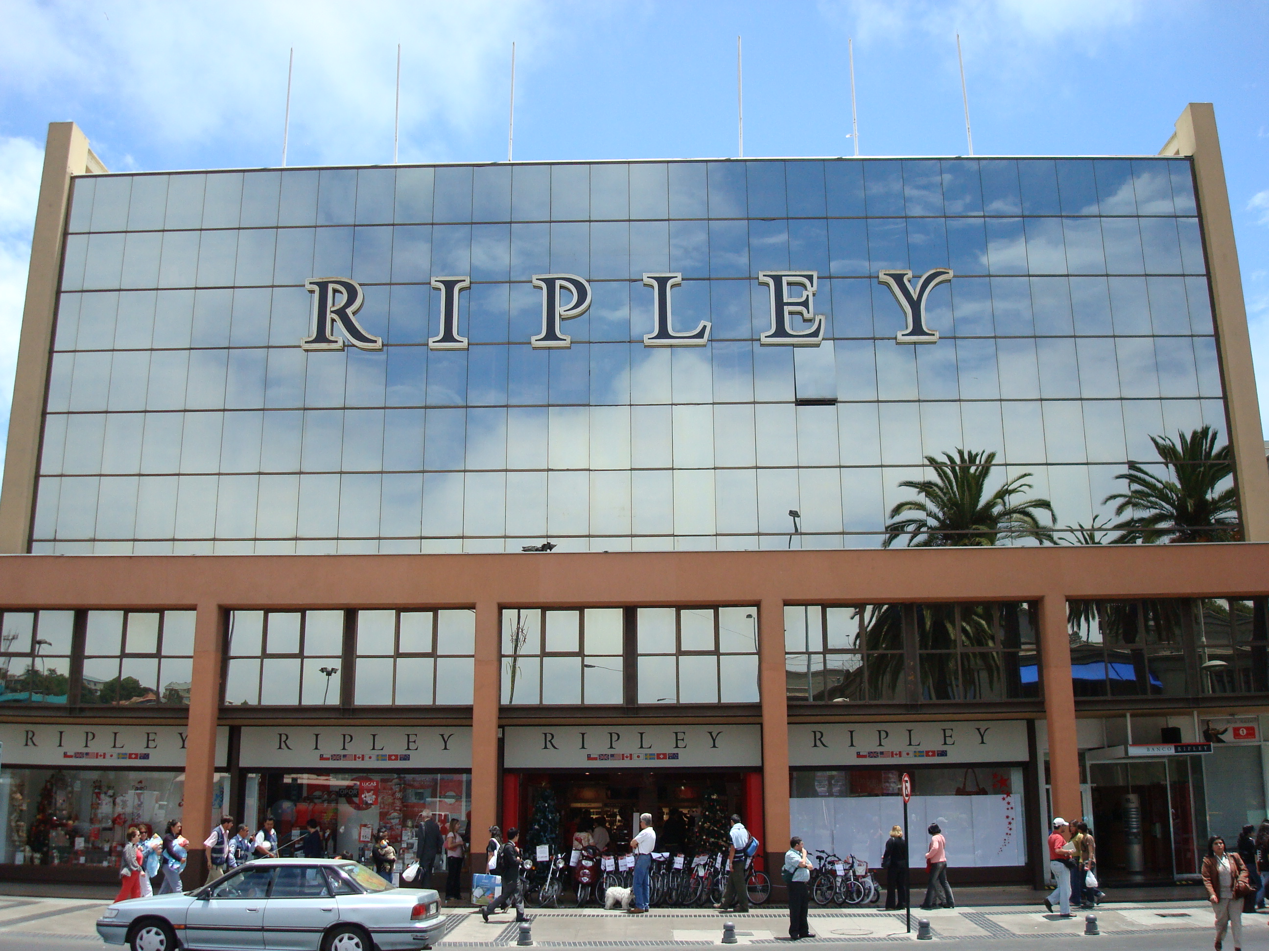 Tienda de Ripley, Viña del Mar, Chile